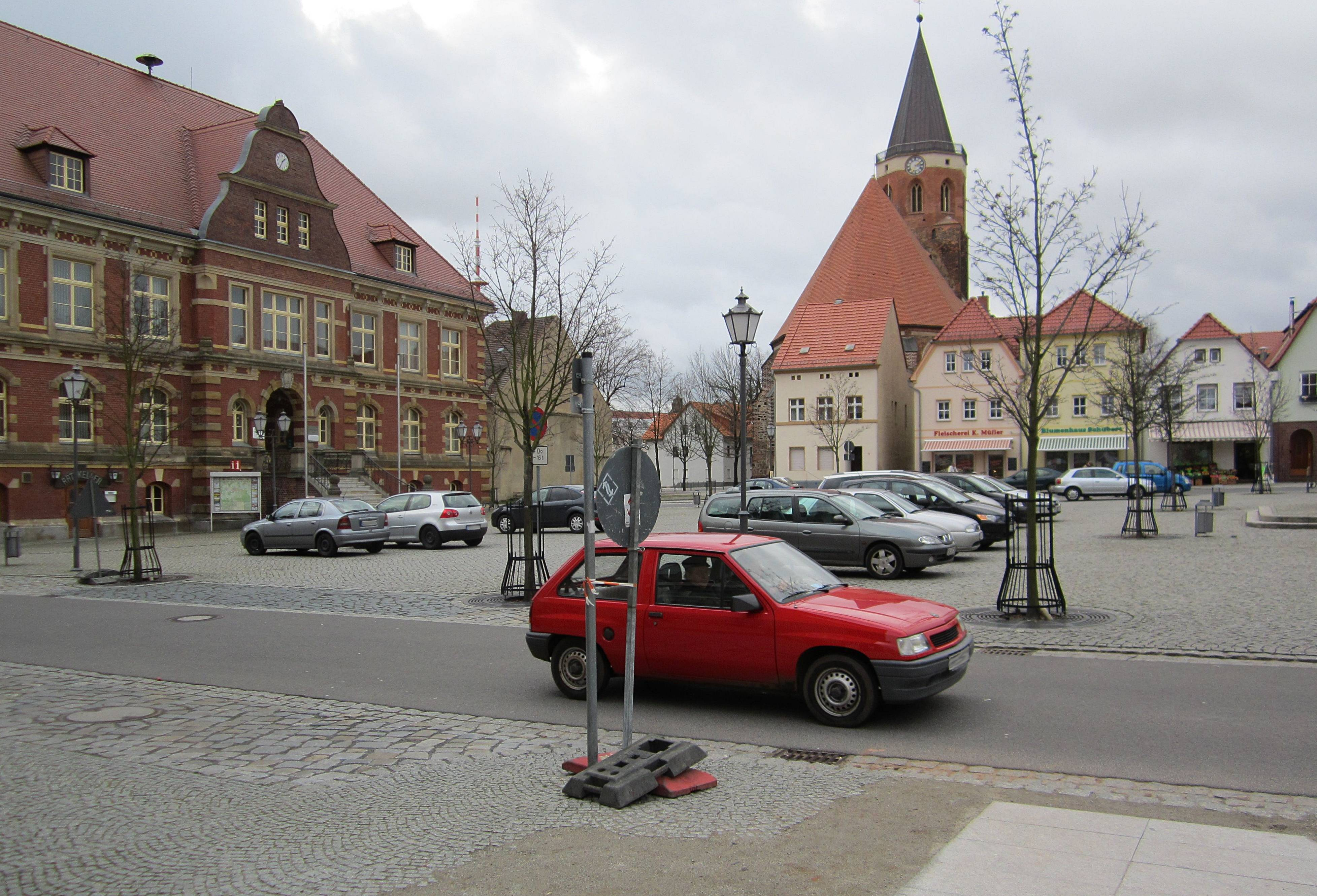 Marktplatz/Platz des Friedens in Calau